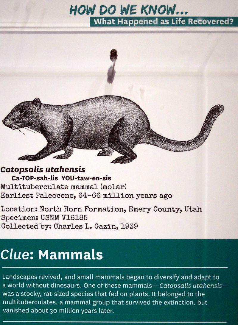 Catopsalis utahensis Gazin